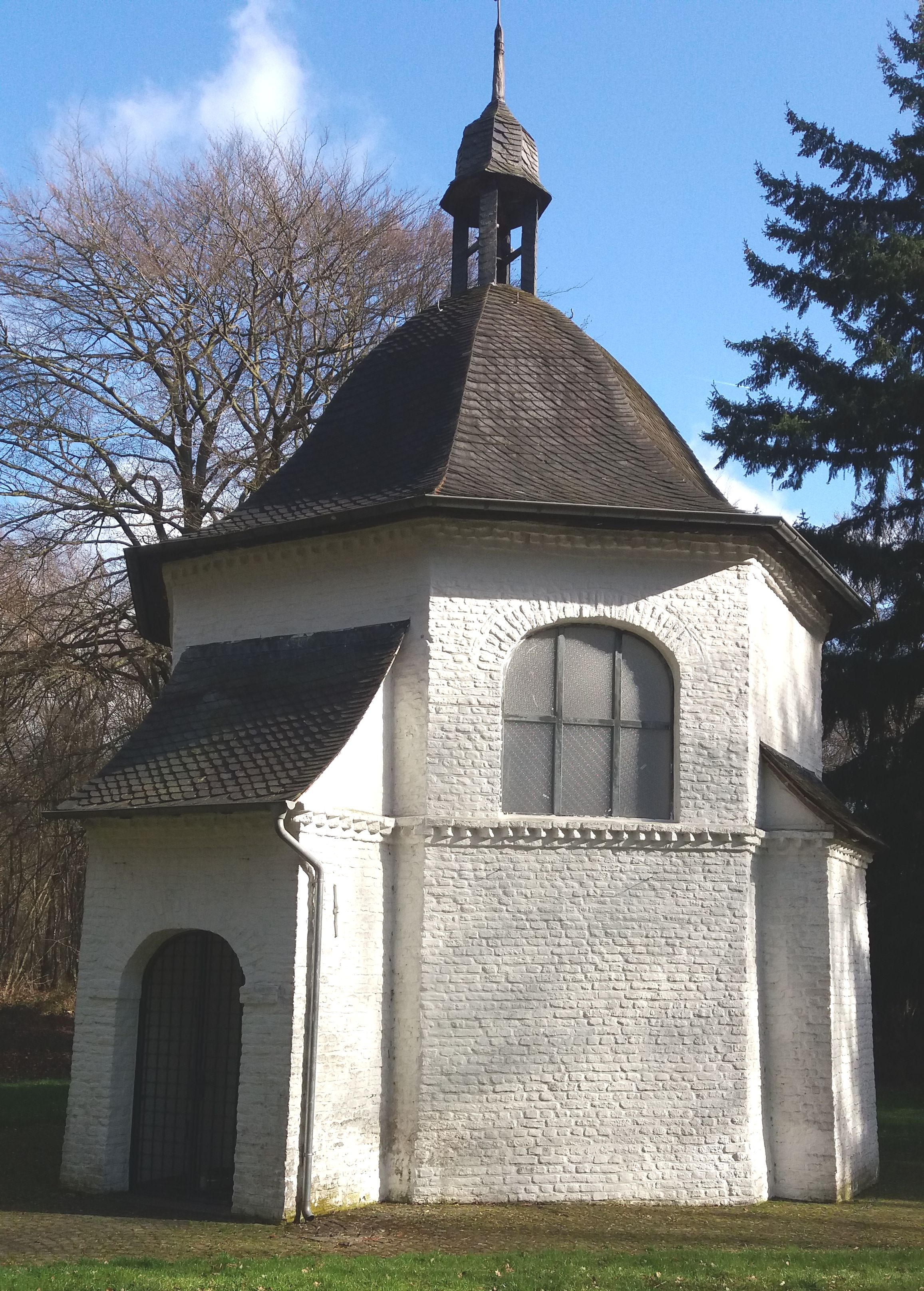 Ulrichskapelle in Tüschenbroich/Wegberg